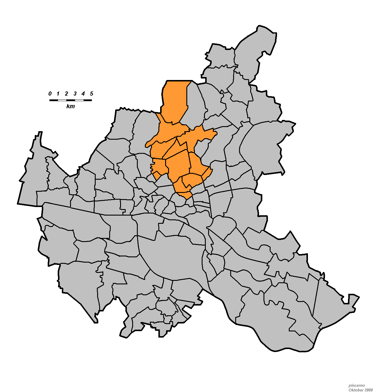 Der Bezirk Hamburg-Nord in Hamburg.